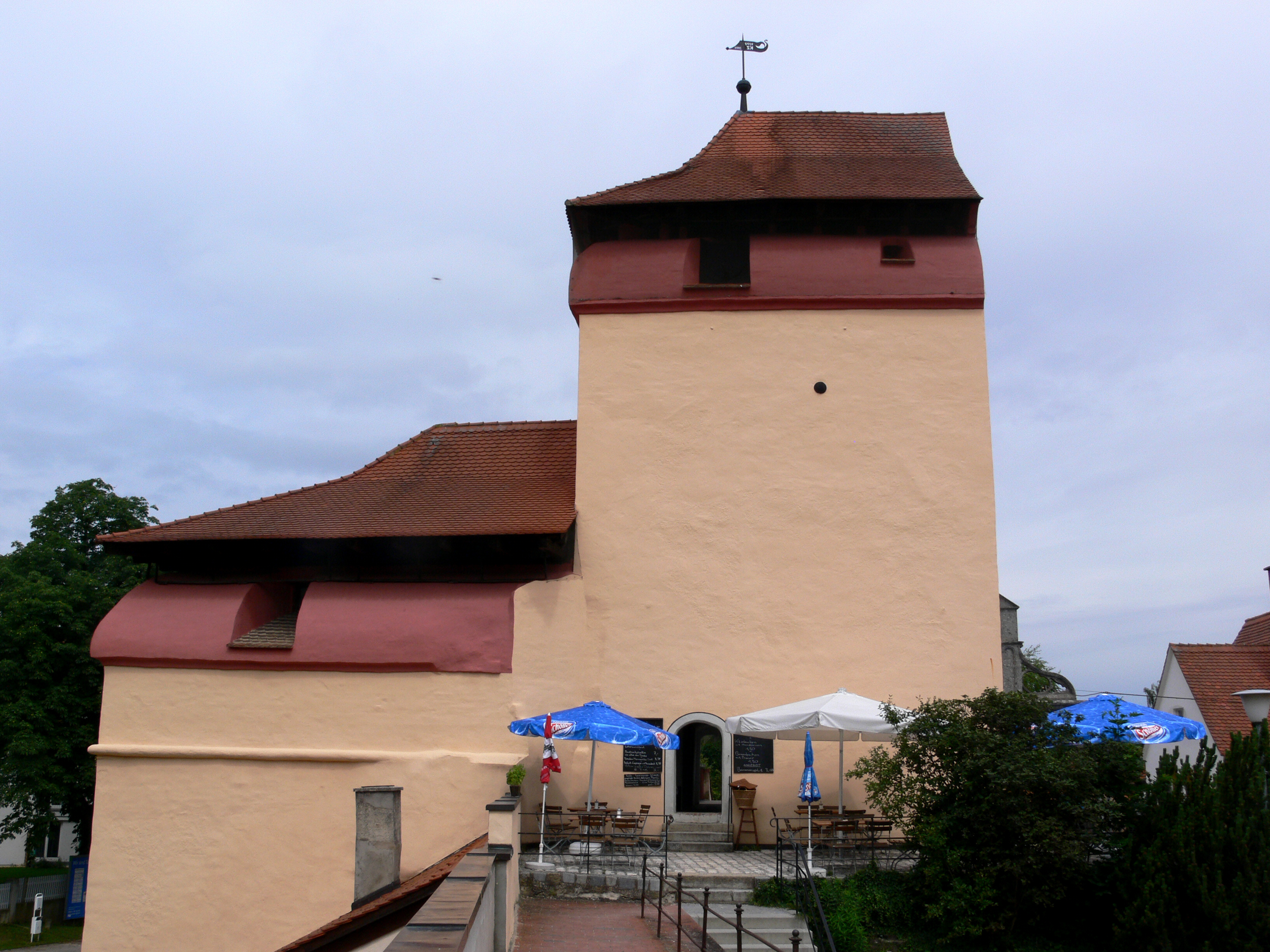 Nördlingen, Blick von der Stadtmauer Berger Tor